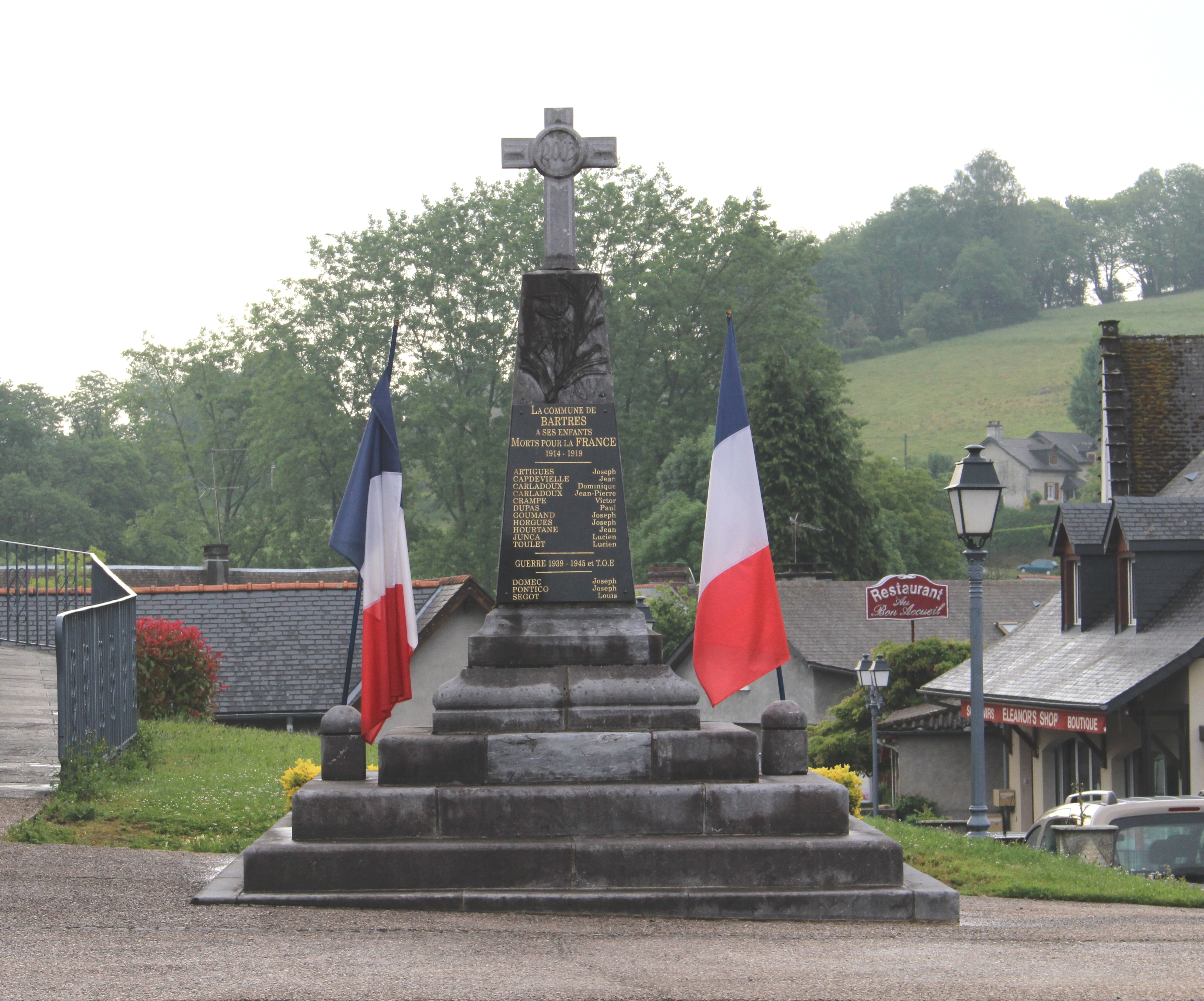 Monument aux morts de Bartrès (Hautes-Pyrénées)